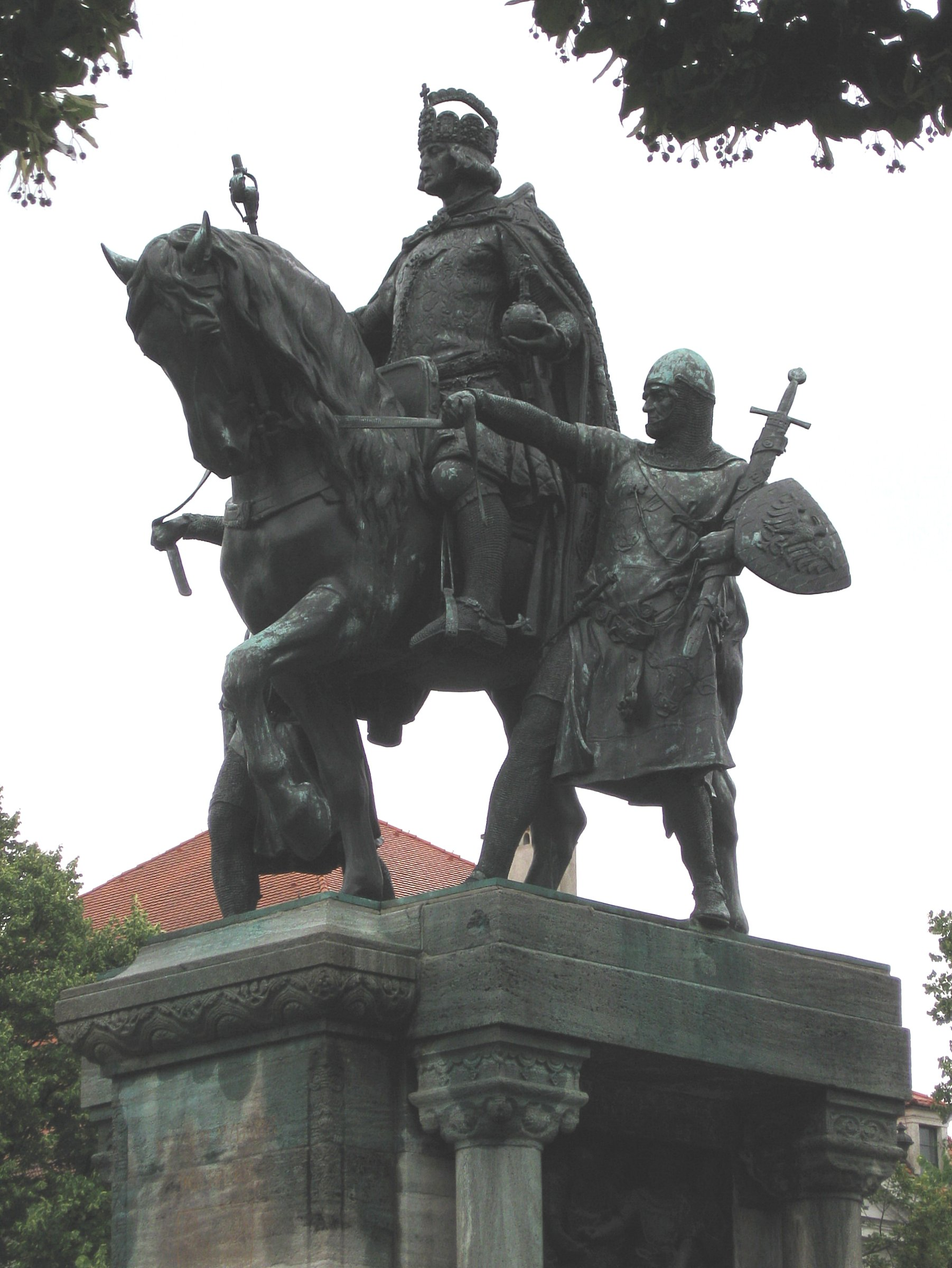 Bronzedenkmal für Ludwig der Bayer (1282–1347, Herzog von Bayern 1294–1347, seit 1314 römischer König, seit 1328 römischer Kaiser), am Kaiser-Ludwig-Platz, 1905 entworfen und gegossen von Ferdinand von Miller d. J.